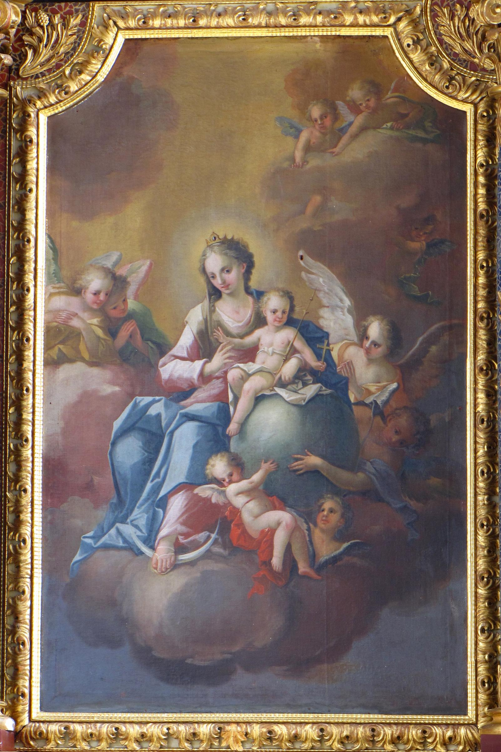 Johann Heel: "Muttergottes mit Jesuskind", Altarblatt (rechter Seitenaltar) in der Pfarrkirche Leuterschach